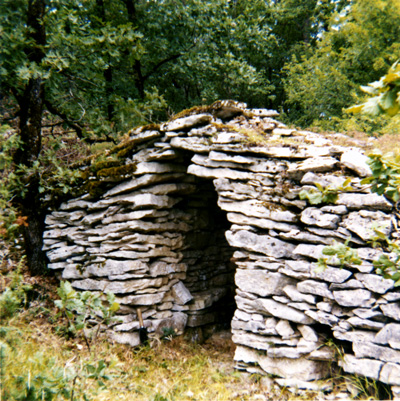 "Gariote" (ou guérite) à Crayssac dans le département du Lot en France. Cet ancien abri de champ ou de vigne pour travailleur agricole du XIXe siècle est pris dans une muraille en pierre sèche.